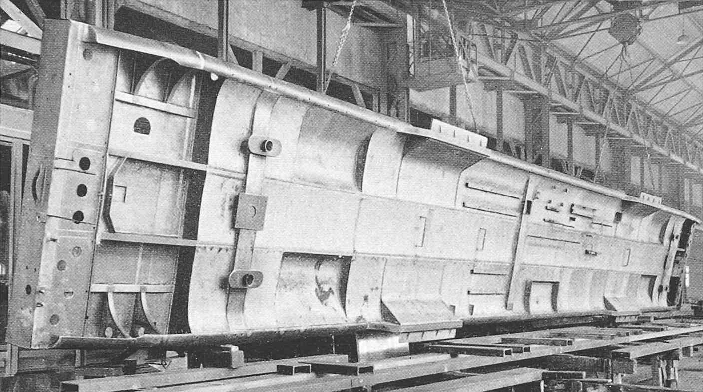 Untersicht des aus 2-mm-Stahlblech geschweissten Wagenbodens eines SBB-Leichtstahlwagens